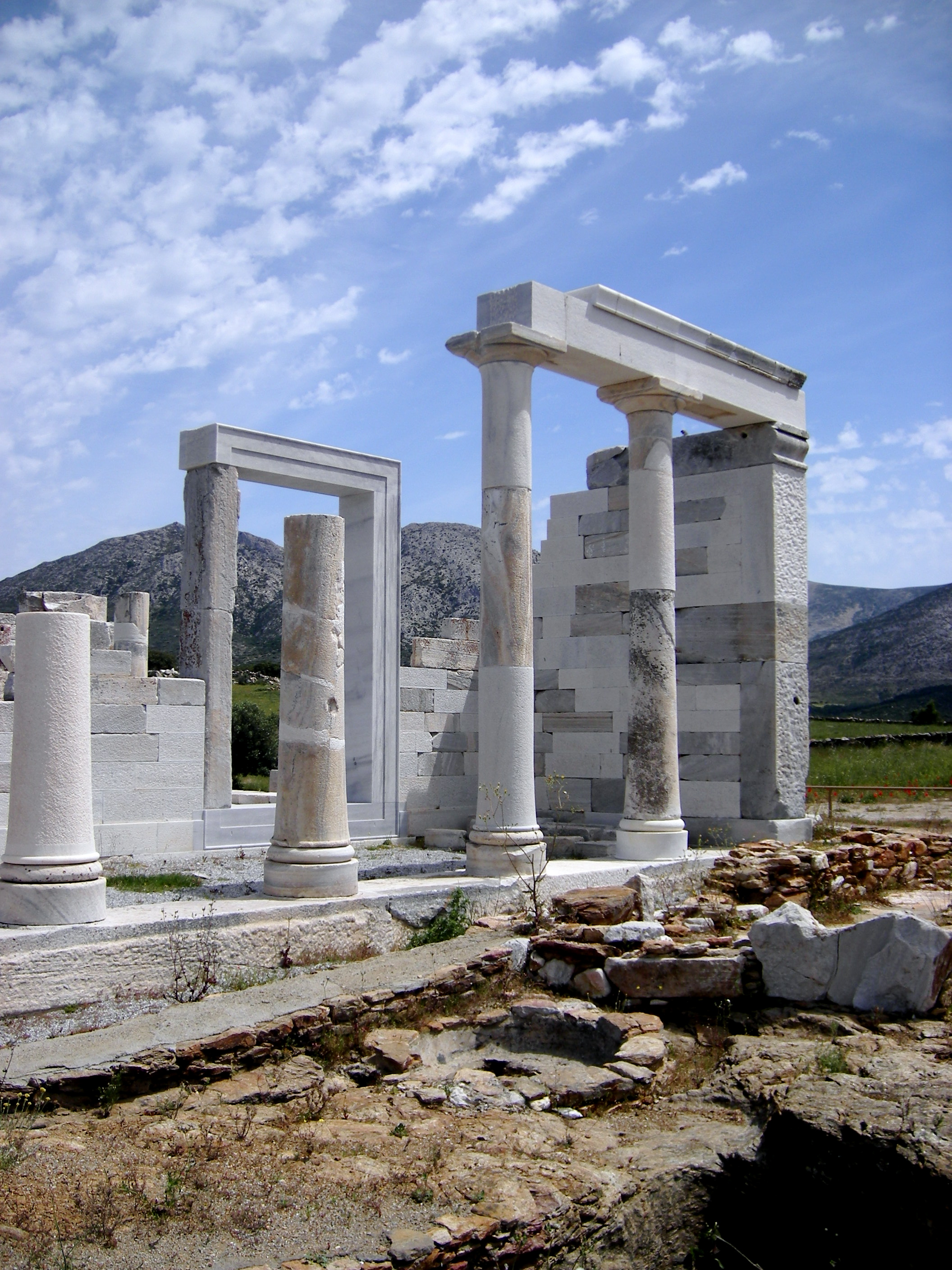 Demeter Temple, Sagri, Naxos